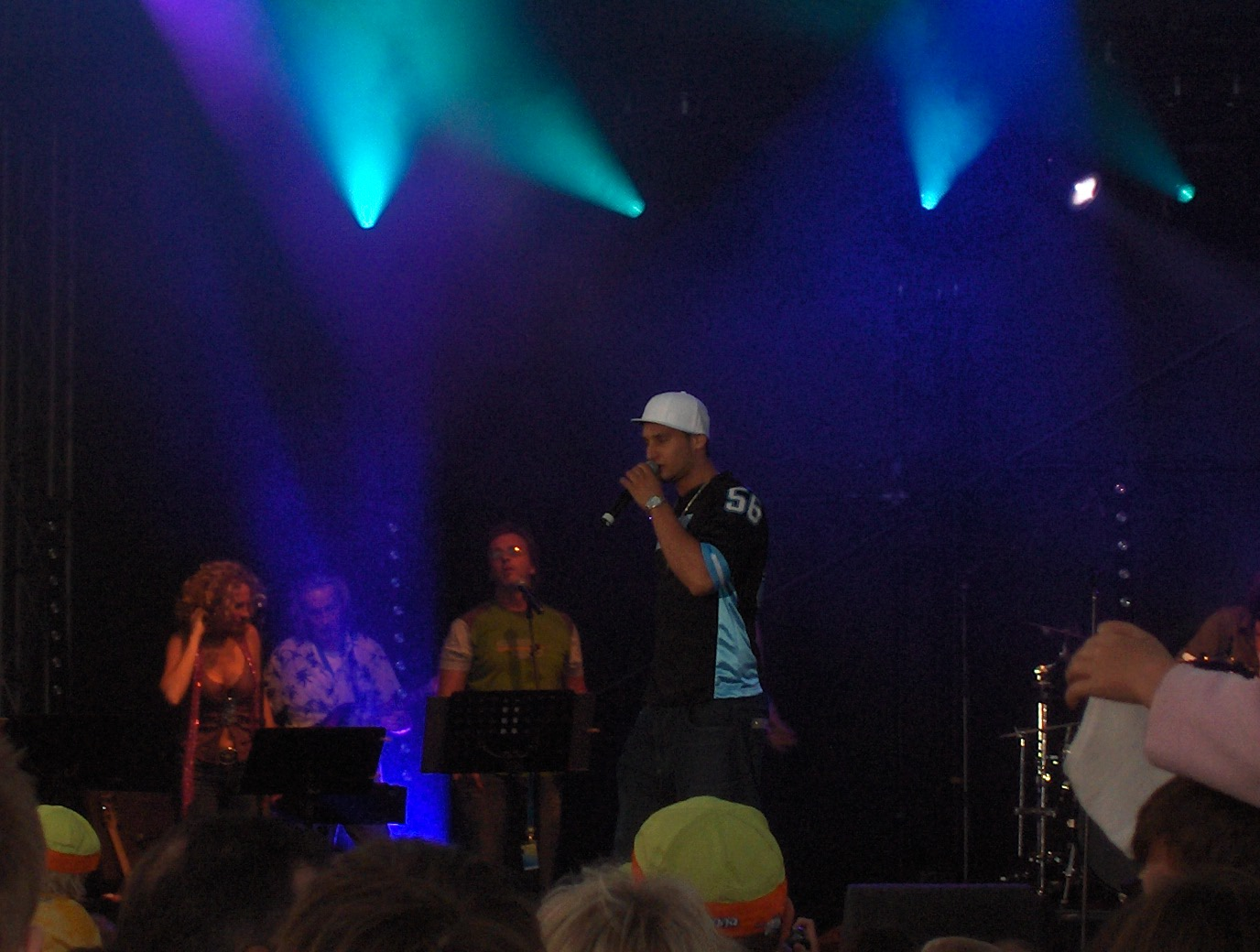 The Belgian singer Brahim Attaeb at Diksmuide (Belgium)